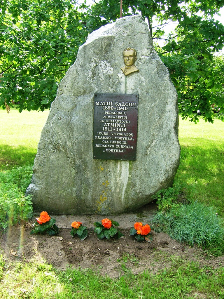 Akmuo Matui Šalčiui atminti